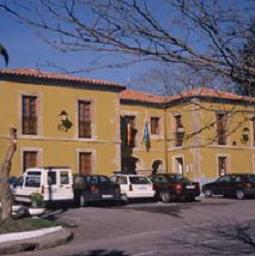 Ayuntamiento del concejo asturiano de Candamo